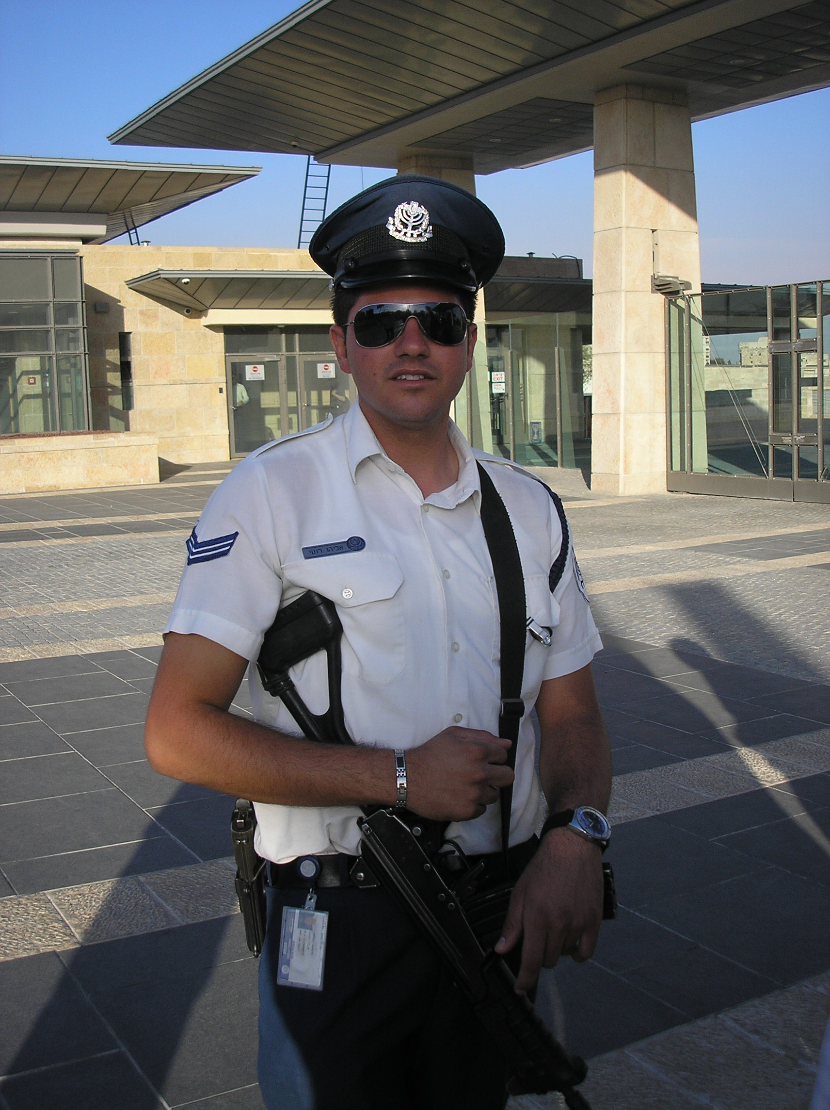 Knesset Guard